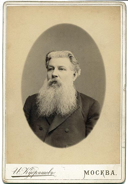 Тихомиров Дмитрий Иванович (1844-1915) - русский педагог. Фото 1890-1900гг И.Кудряшова, Москва.